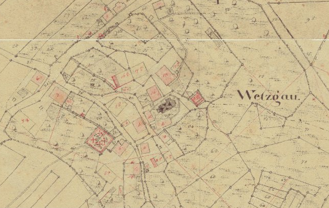 Karte Wetzgau, Oberamt Welzheim, heute Stadtteil von Schwäbisch Gmünd, um 1830. Kartenausschnitt: Vermessungsergebnis der württembergischen Landesvermessung (Originalmaßstab 1:2.500)